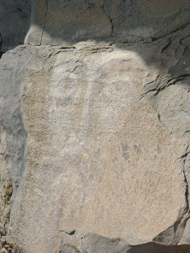 Лик Христа. Нижне-Архызский историко-архитектурный и археологический комплекс. Карачаево-Черкессия. Музей-заповедник